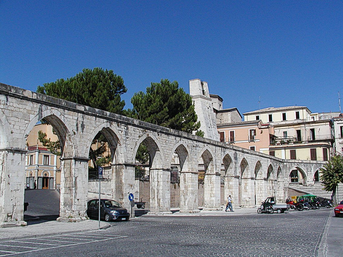 Acquedotto medievale, Chiesa di San Francesco della Scarpa